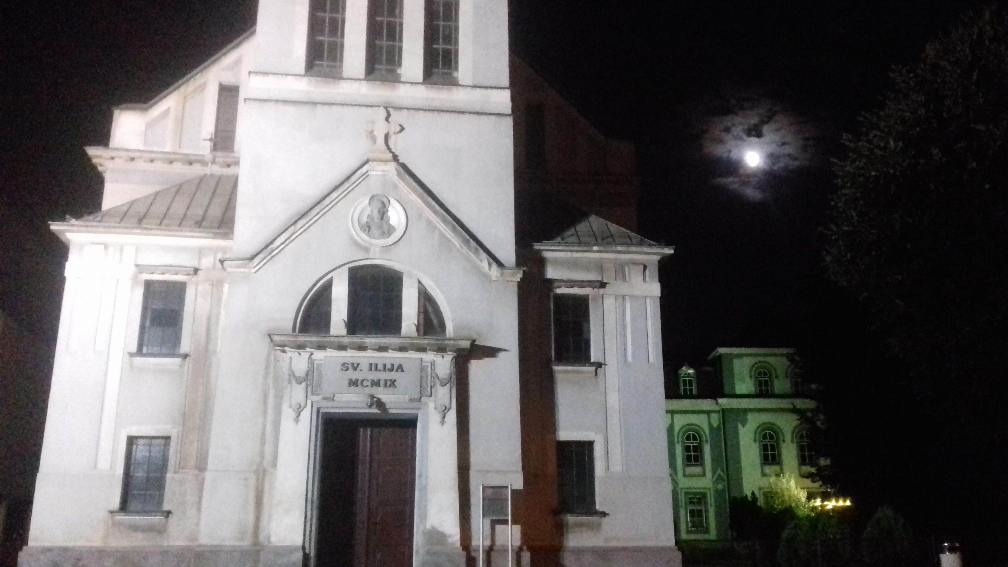 ЦРКВА и крст